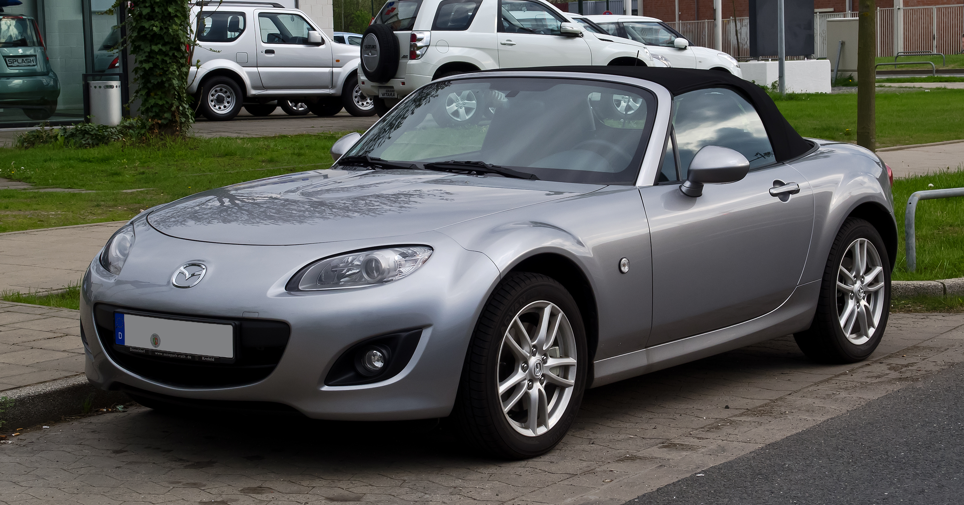 Mazda MX-5 Roadster (III, Facelift)